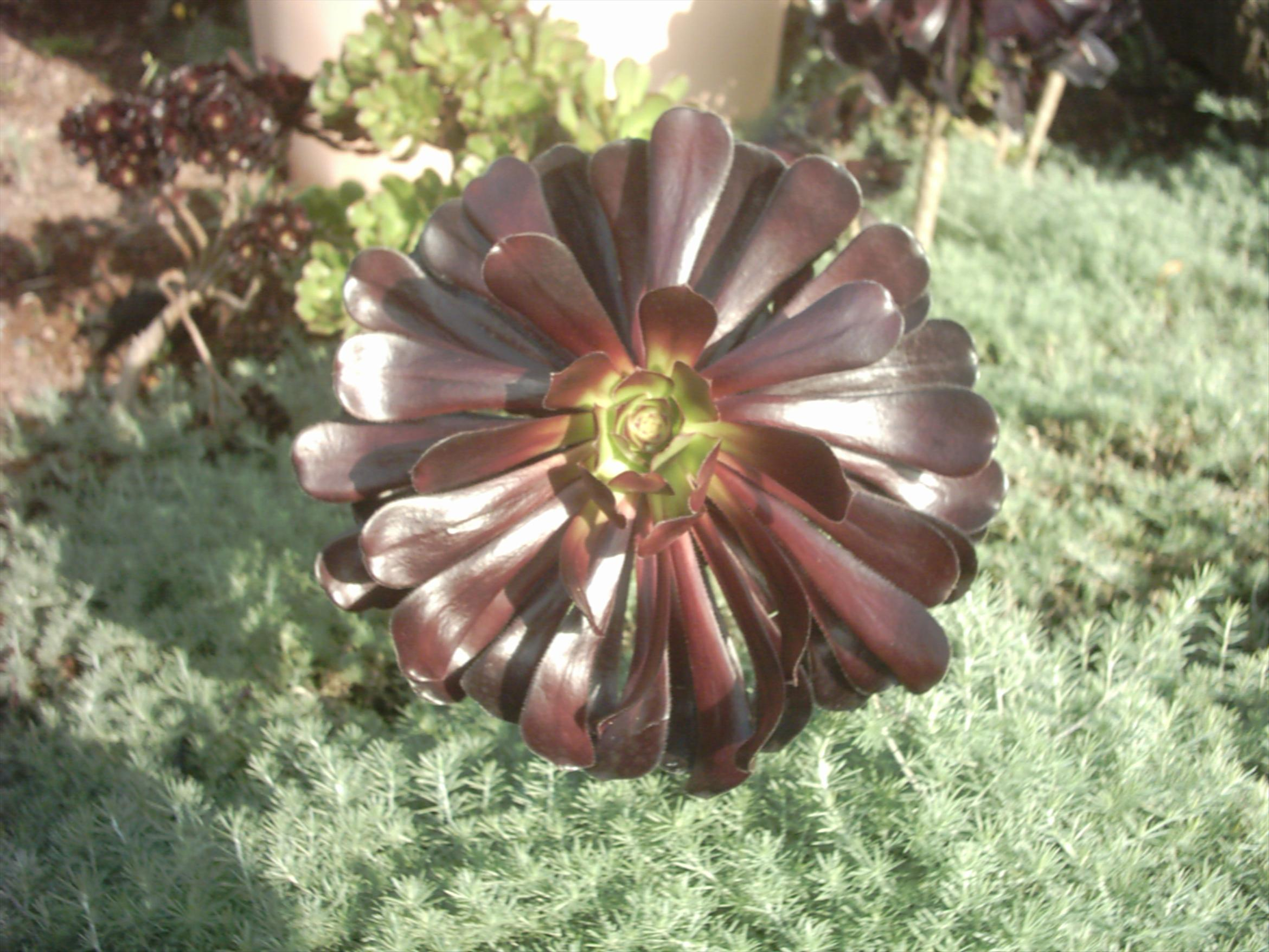 Aeonium arboreum ssp.Atropurpureum - botanischer Garten Düsseldorf.